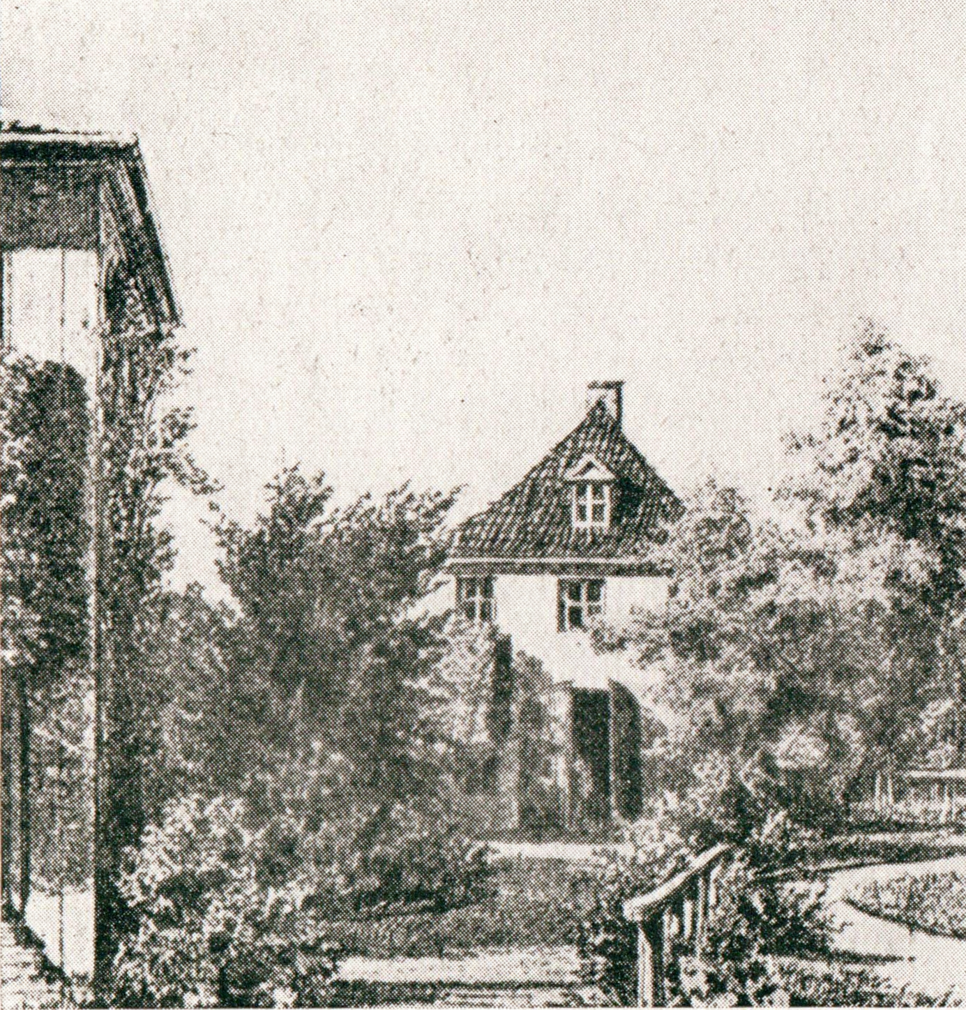 Villa am Harvestehuder Weg, Hamburg; Lithographie von Valentin Ruths: Landhäuser an der Alster - In: Panorama der Landhäuser an der Alster bis nach Harvestehude (1850), S.1; Ausschnitt, hier: Harvestehuder Weg 1-4